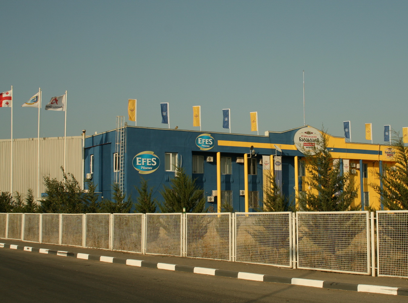 Пивзавод "Натахтари" в селе Натахтари в Мухранской долине, Грузия (Пивзавод в селе Натахтари, производящий одноименное пиво и вроде бы еще пиво "Касрис". Самый популярный в Грузии бренд. Говорят, тут хорошая вода в артезианских скважинах)